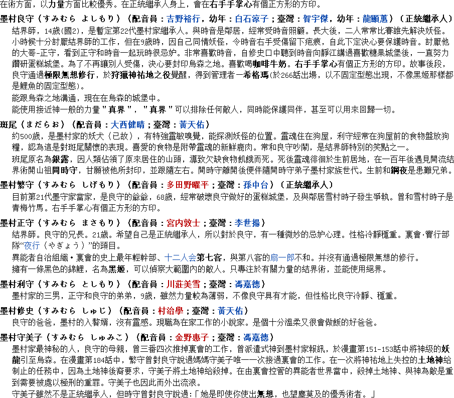 GNU Unifont中文字型示範 使用軟體:Firefox 10.0.1 截圖文章:w:zh:結界師角色列表#墨村家